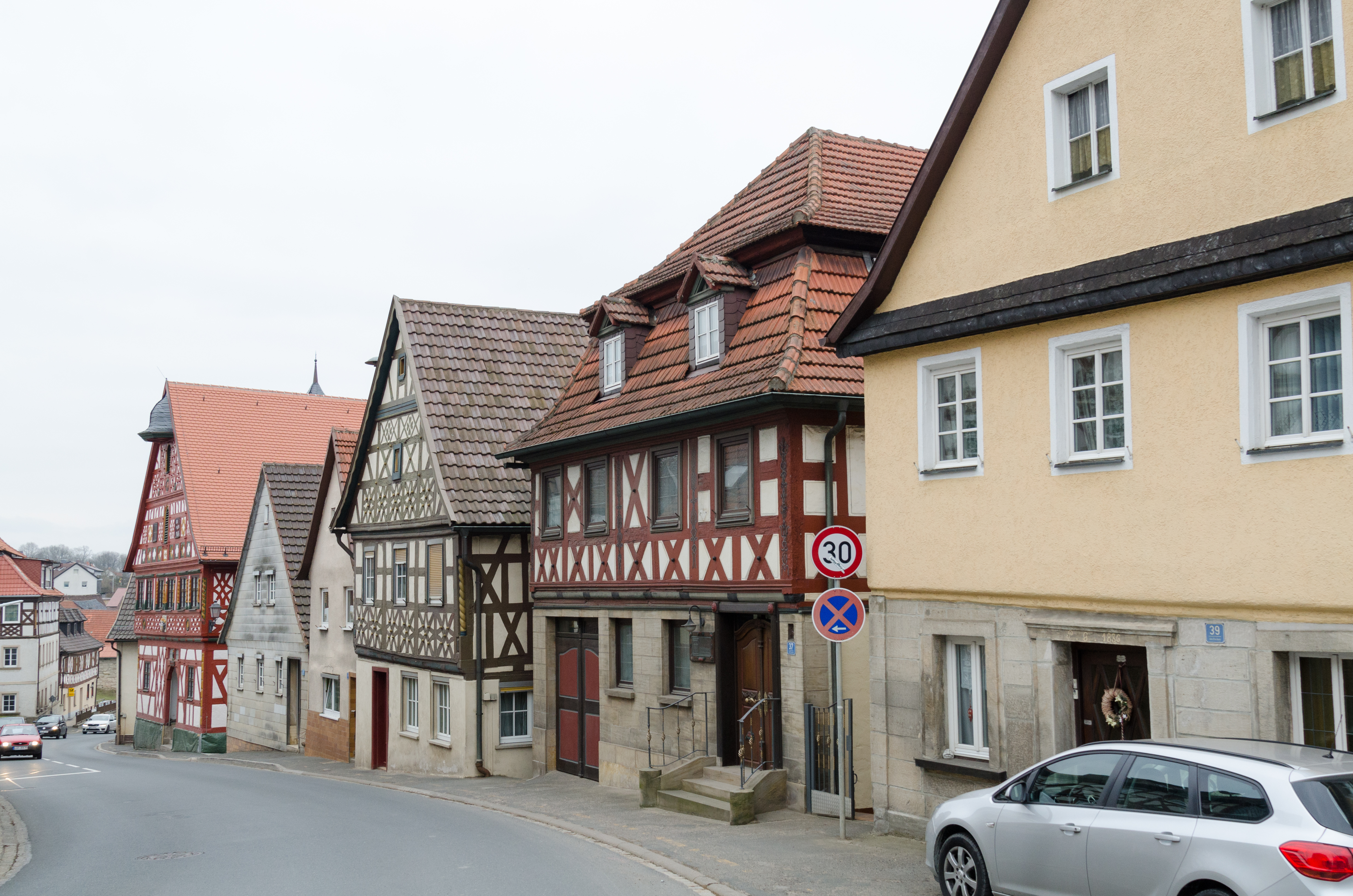 Marktzeuln, Am Flecken 27, 29, 31, 33, 35, 37